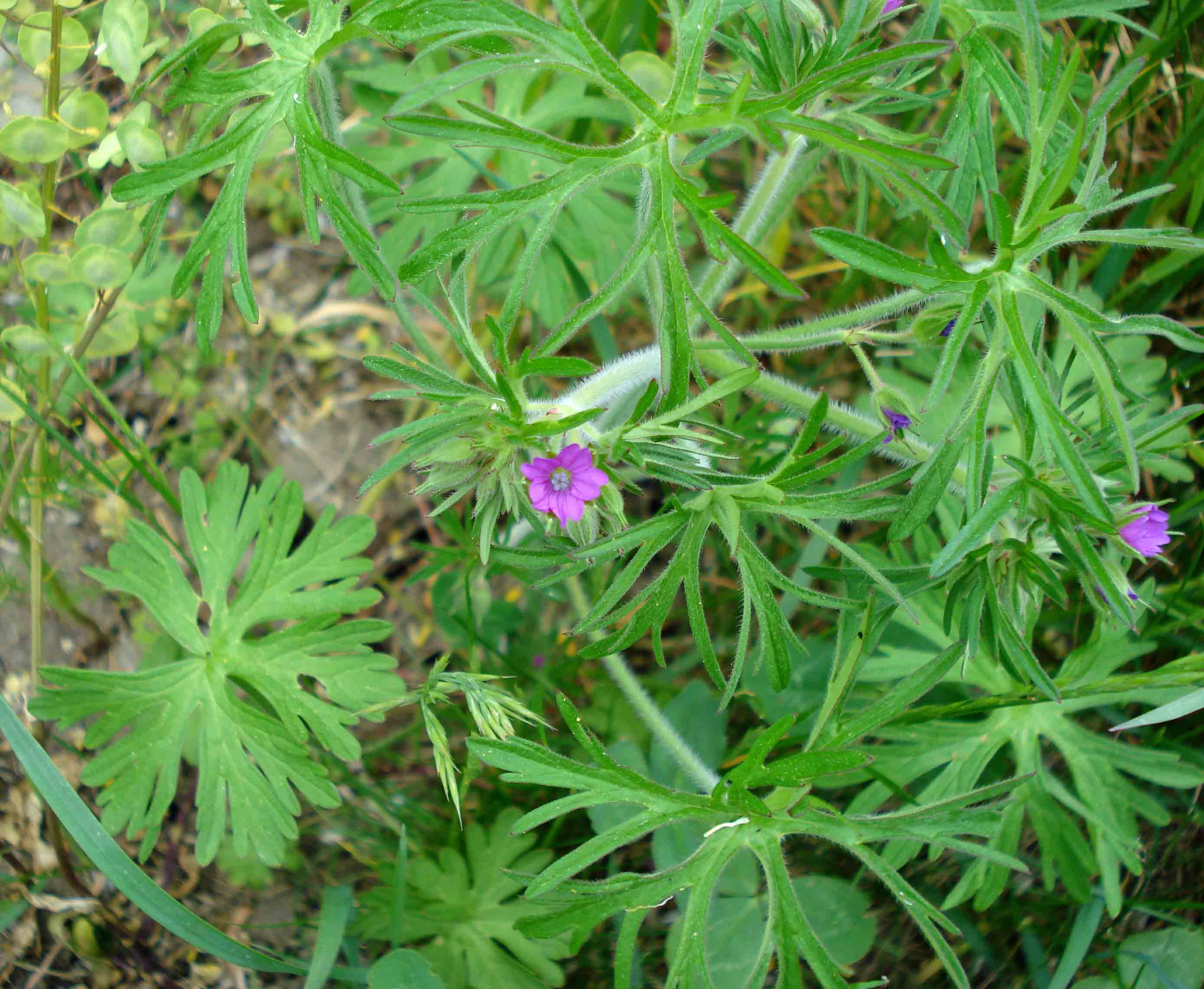 Geranium dissectum (Unterfranken, Germany)